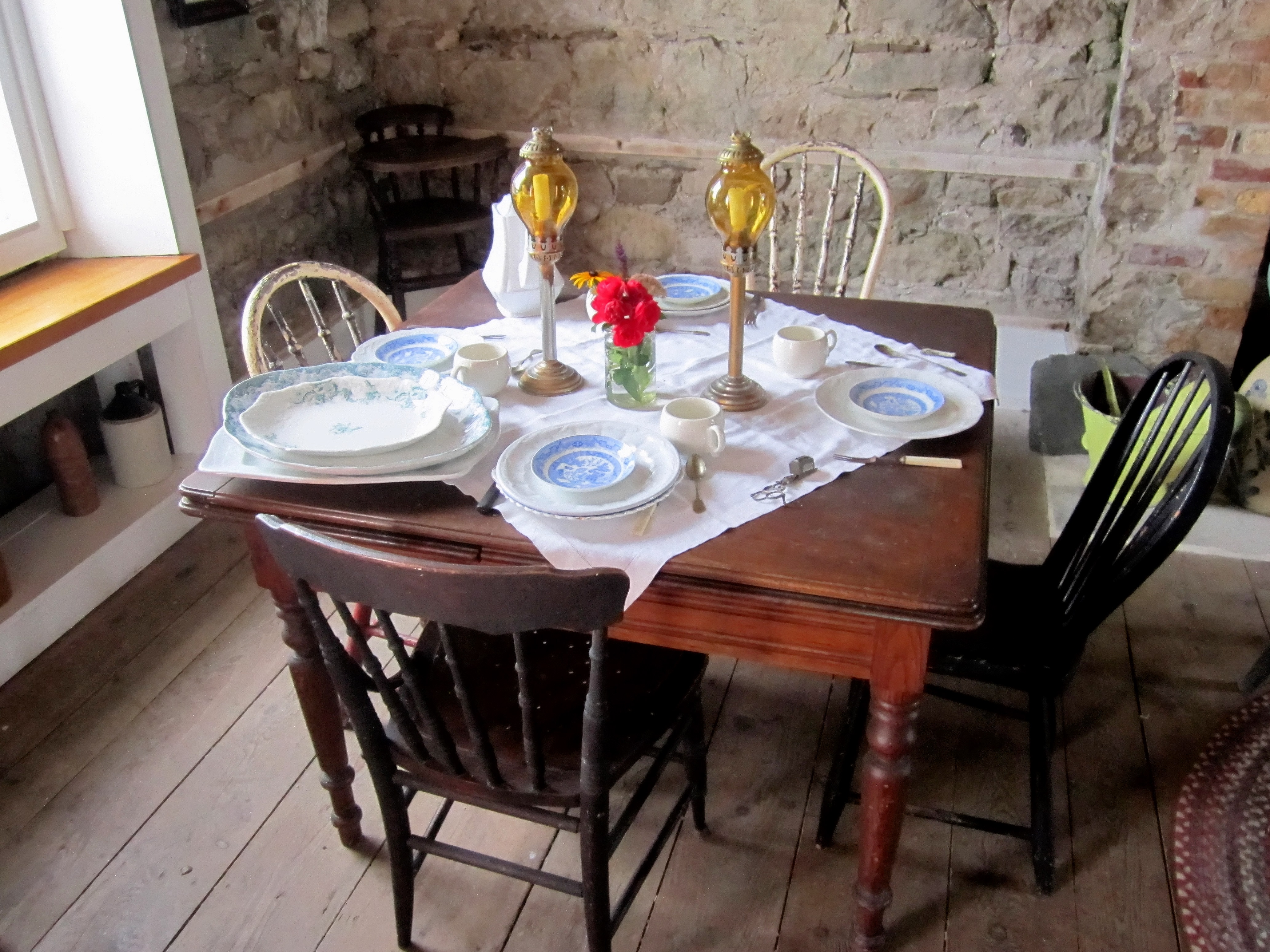 Dining Table - Living Room